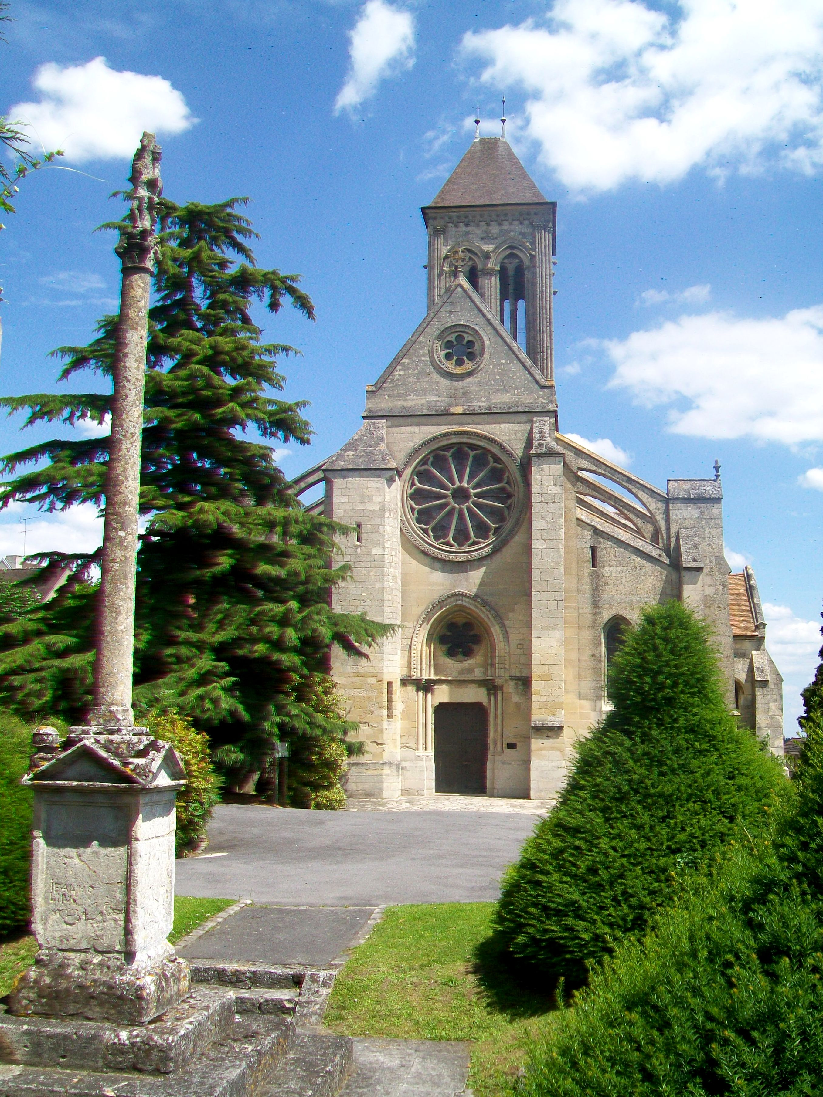 Le calvaire classé M.H. et la façade occidentale de l'église.